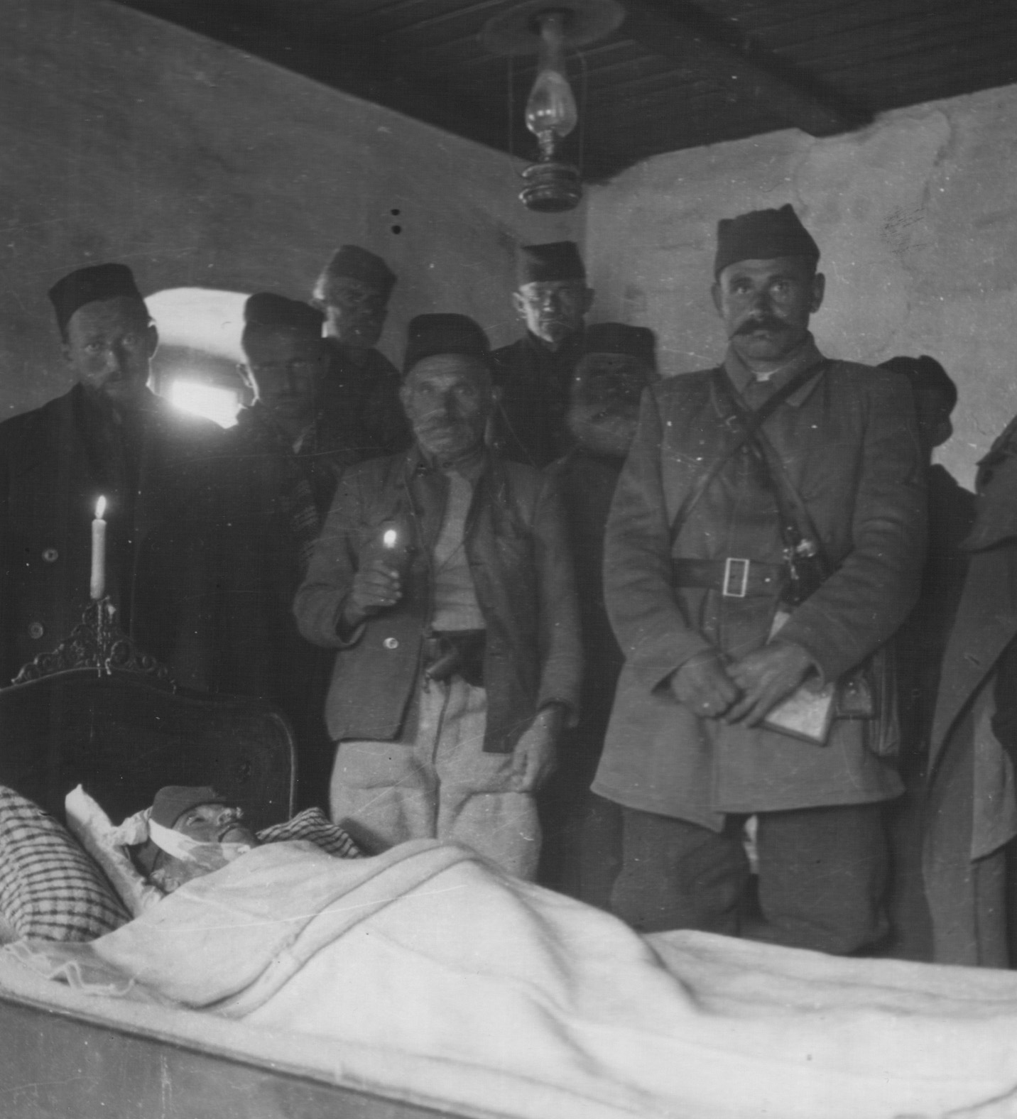 Srpskohrvatski / српскохрватски: Na odru leži komandant III divizije Pero Ćetković. Kraj odra stoje Sava Kovačević i otac poginulog, koji drži sveću.